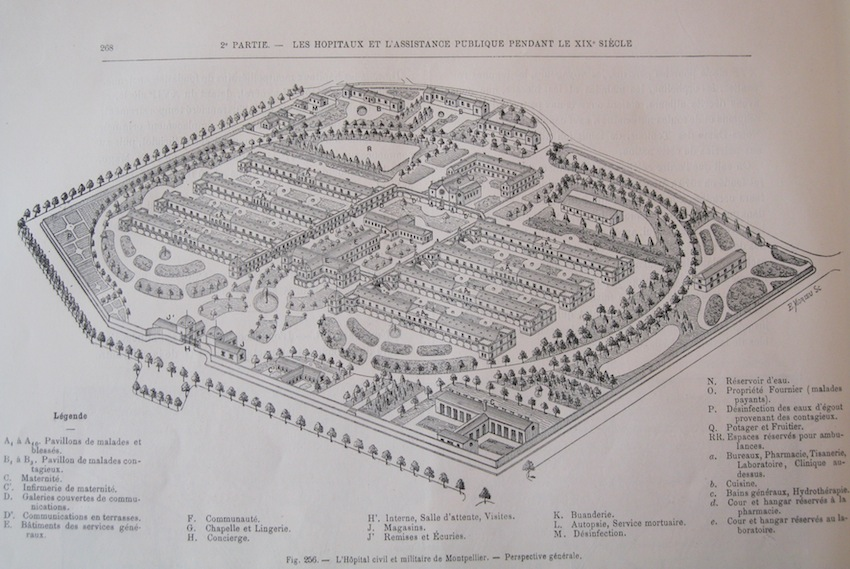 L'Hôpital civil et militaire de Montpellier - Perspective générale